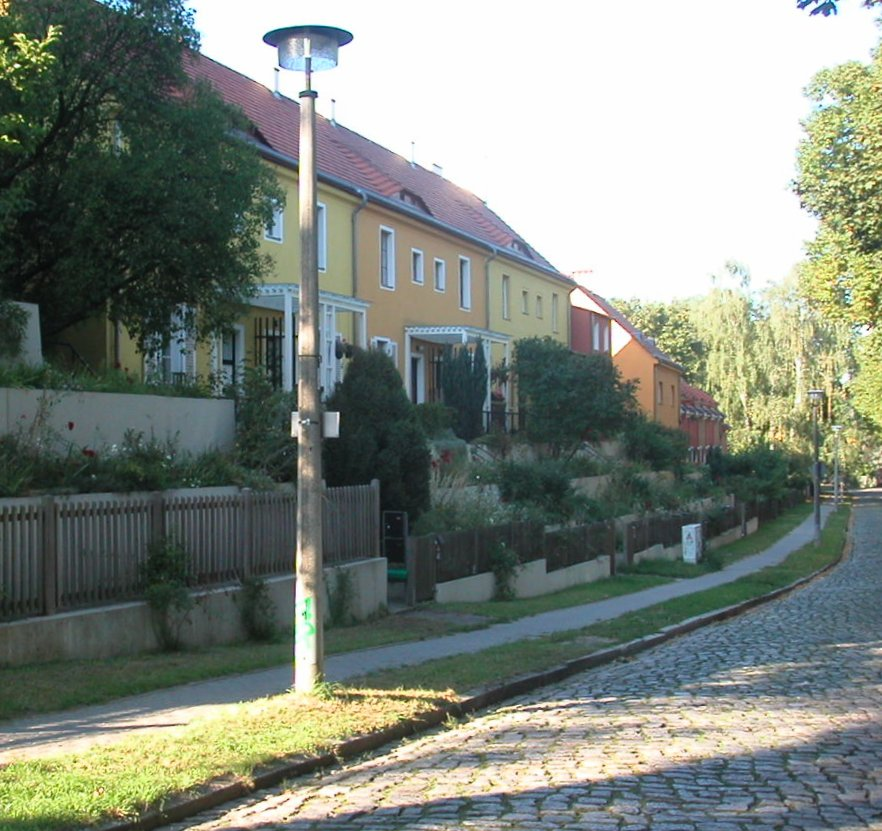 Tuschkastensiedlung, Gartenstadtweg, Berlin-Bohnsdorf.